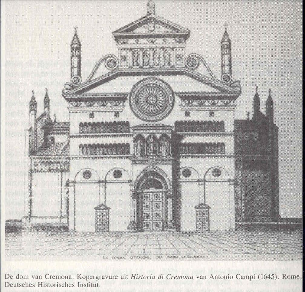 Ets uit 1645 Dom